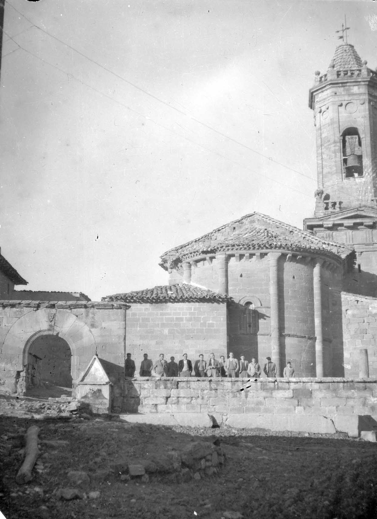 Olexoako elizaren ikuspegia.